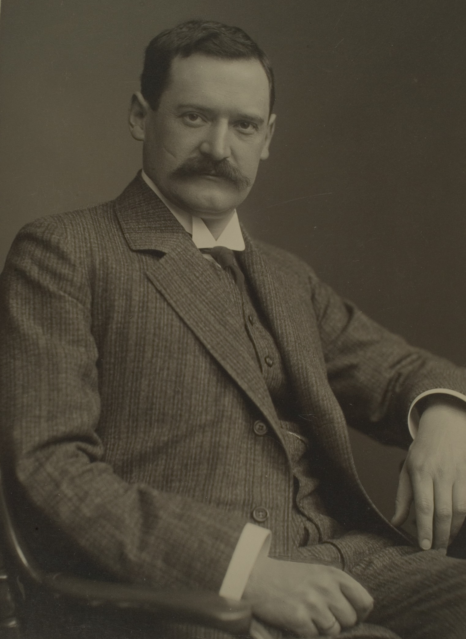 Karl August Heinsheimer, Jurist, 1907–1929 Professor in Heidelberg